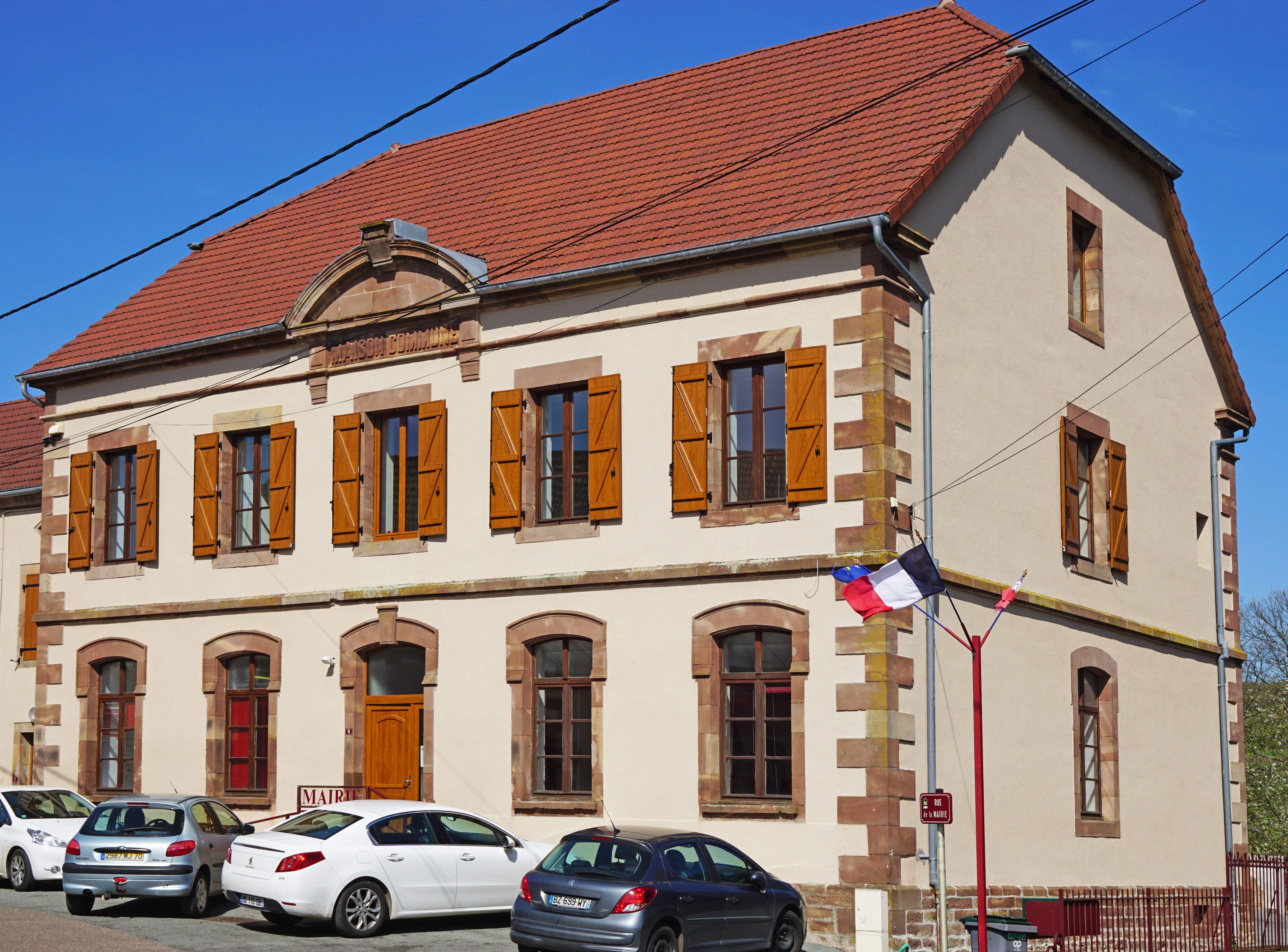 La mairie de Lomont.